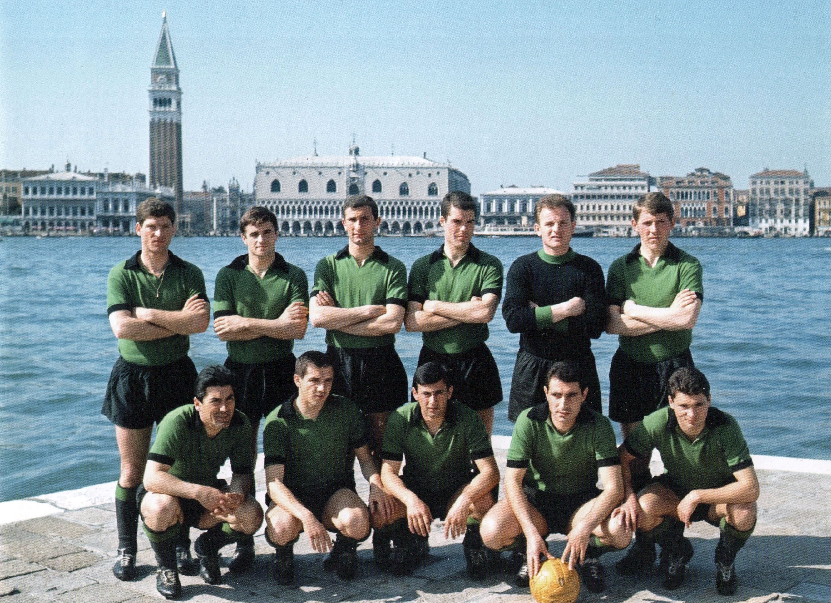 Una formazione del Venezia nella stagione 1963-64. L'immagine è stata scattata sull'isola di San Giorgio Maggiore, sullo sfondo del campanile di San Marco e del palazzo Ducale; nella foto, la squadra lagunare indossa la sua storica divisa neroverde, in seguito abbandonata dopo la fusione del 1987 con il Mestre. Da sinistra, in piedi: B. Santon, A. De Bellis, G. Salvemini, L. Mujesan, E. Magnanini, F. De Marchi; accosciati: M. Tesconi, P. Sartore, E. Mancin, M. Neri, F. Dori.